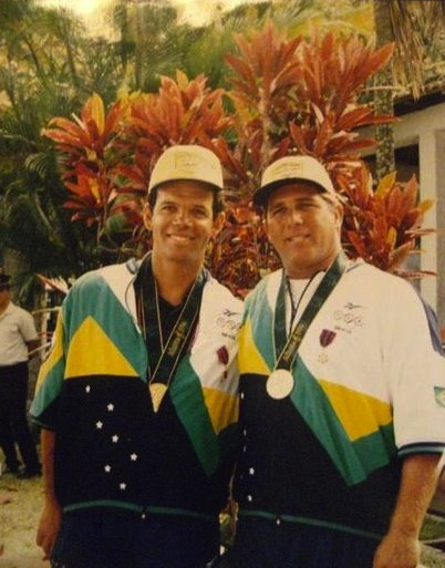 Torben Grael e Marcelo Ferreira recebendo a medalha olímpica na classe Star em Atenas 2006